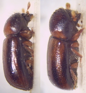 Trypodendron_lineatum__Männchen_Weibchen_20fach_von_rechts